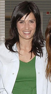 Elia Galera en la serie Hospital Central